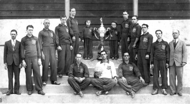 Grupo dos campeões gaúchos de 1933